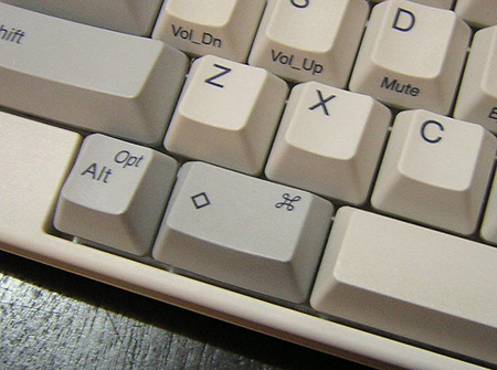 Meta key on HHK